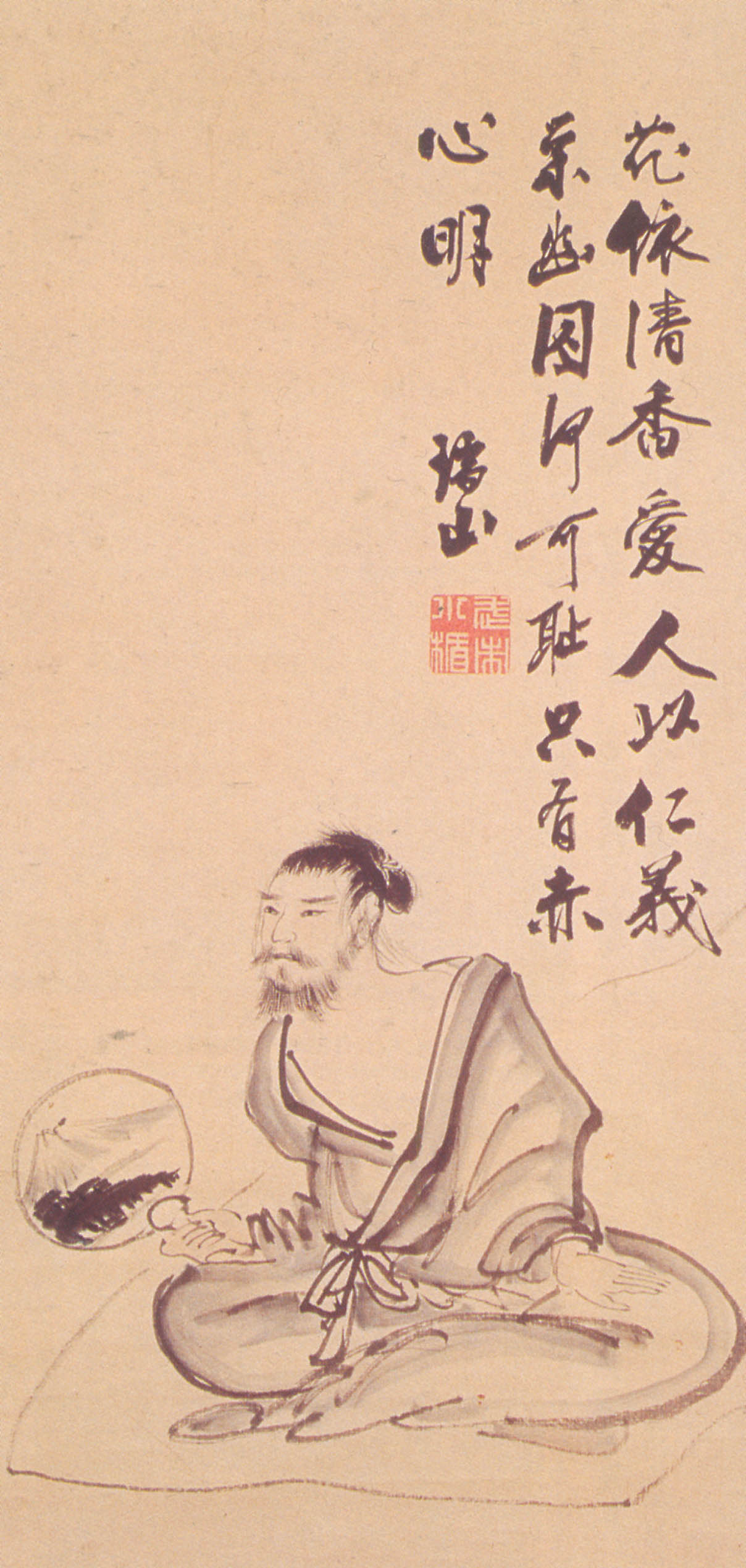 武市半平太が獄中において書いた自画像。